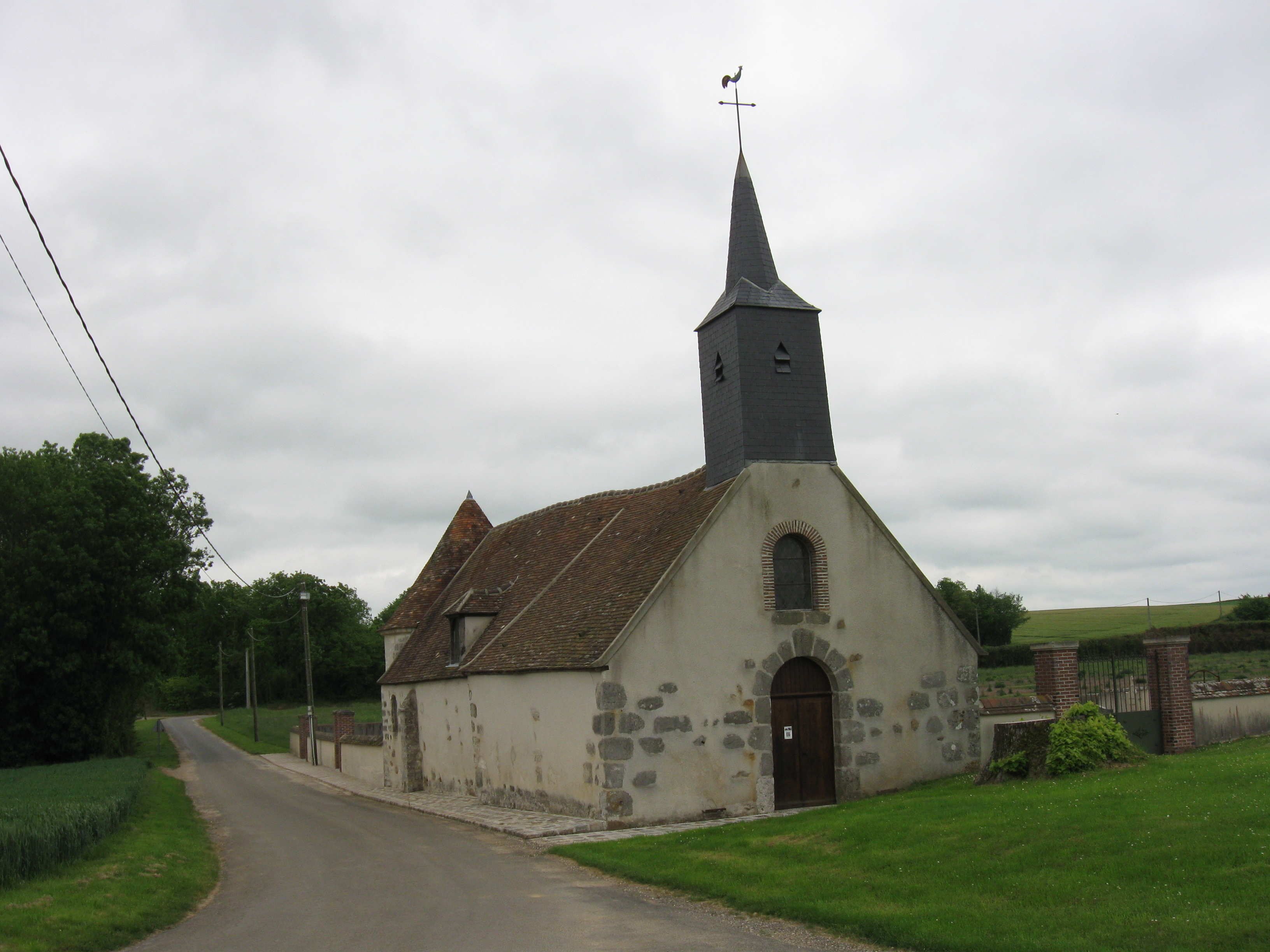 Chapelle Saint-Anne de Baby. (Seine-et-Marne, région Île-de-France).